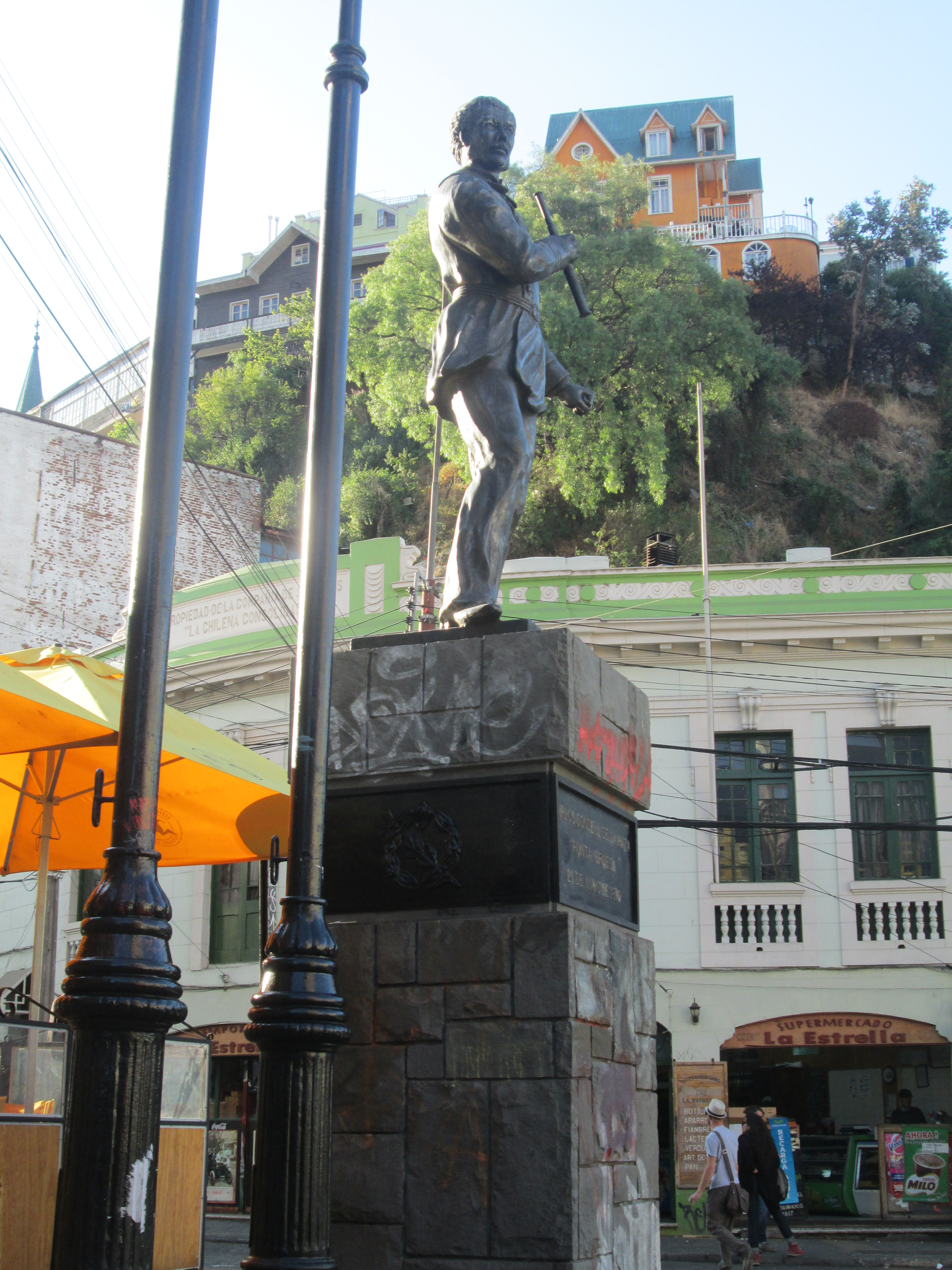 Estataua de Carlos Condell de la Haza, en la plaza Anibal Pinto de Valparaíso